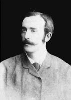 Кароль Ян Александр Гуттен-Чапский (1860—1904) — губернатор Минска.